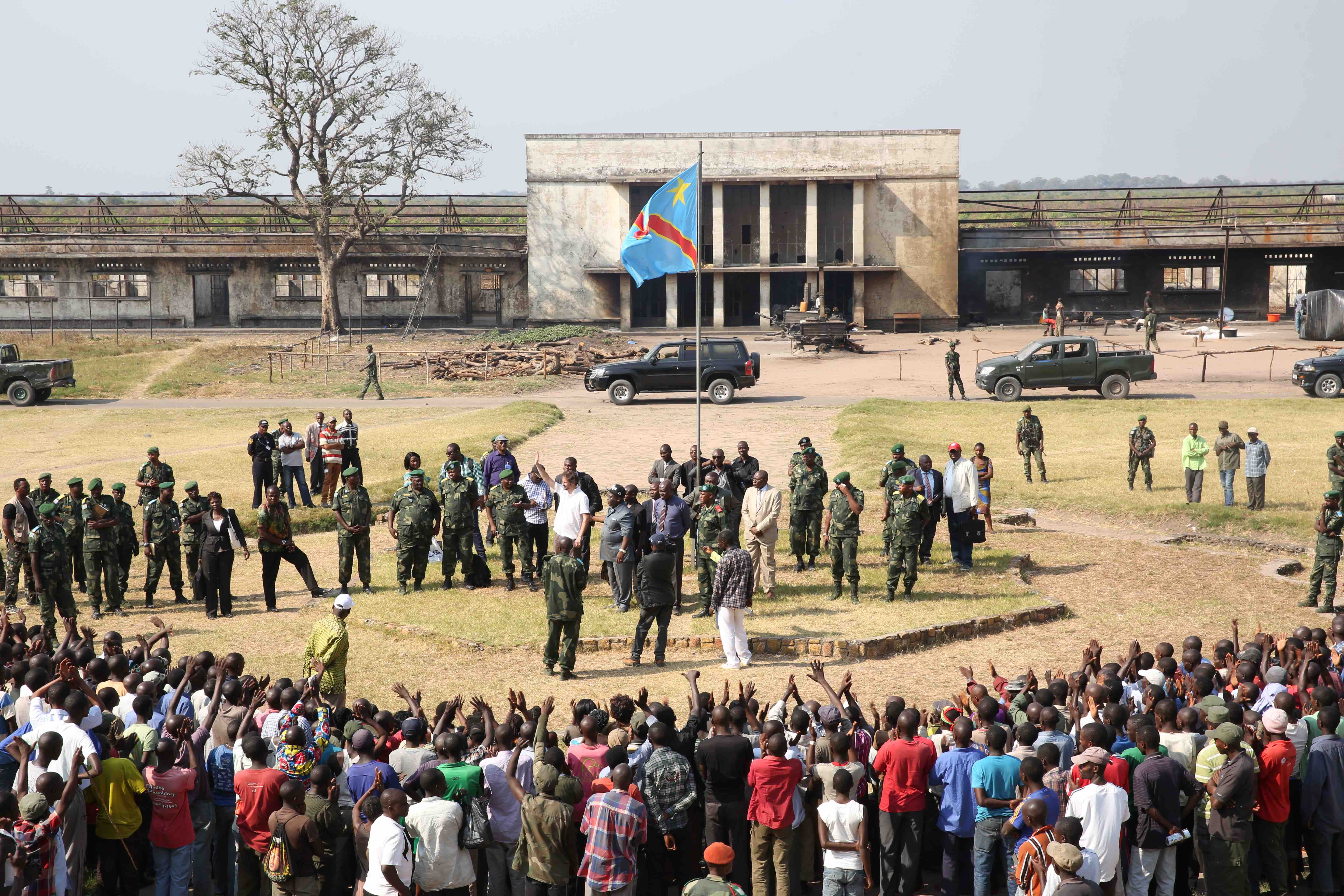 Kamina, province du Katanga, RD Congo : Le Ministre de la défense, des anciens combattants et de la réinsertion, Aimé Ngoy Mukena, accompagné de José Maria Aranaz, directeur du Bureau conjoint des Nations Unies pour les droits de l’homme, saluent les ex-combattants arrivés sur le site de regroupement de Kamina. Le processus de relocalisation est maintenant terminé. Au total ce sont 1194 ex-combattants et leurs dépendants qui ont été transportés par la MONUSCO de Gbadolite à Kamina. Photo MONUSCO/Abel Kavanagh == Kamina, Katanga province, DR Congo: The Minister of Defence, Veterans and Reintegration, Aimé Ngoy Mukena, accompanied by José Maria Aranaz, Director of the United Nations Joint Human Rights Office, welcomed the ex-combatants on the Kamina cantonment site. The relocation process is now complete. In total, 1,194 ex-combatants and their dependents were transferred by MONUSCO from Gbadolite to Kamina. Photo MONUSCO/Abel Kavanagh